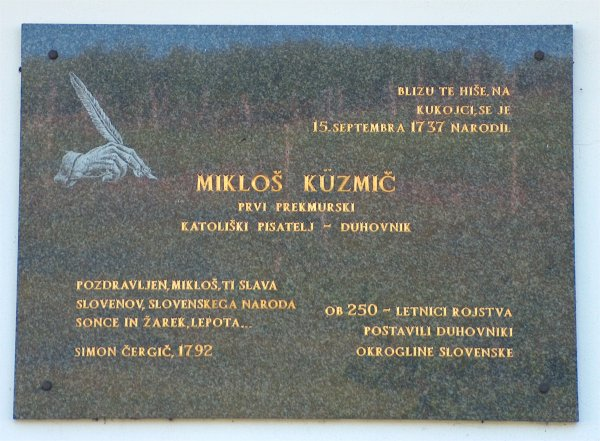 The memorial of Miklós Küzmics in Dolnji Slaveči